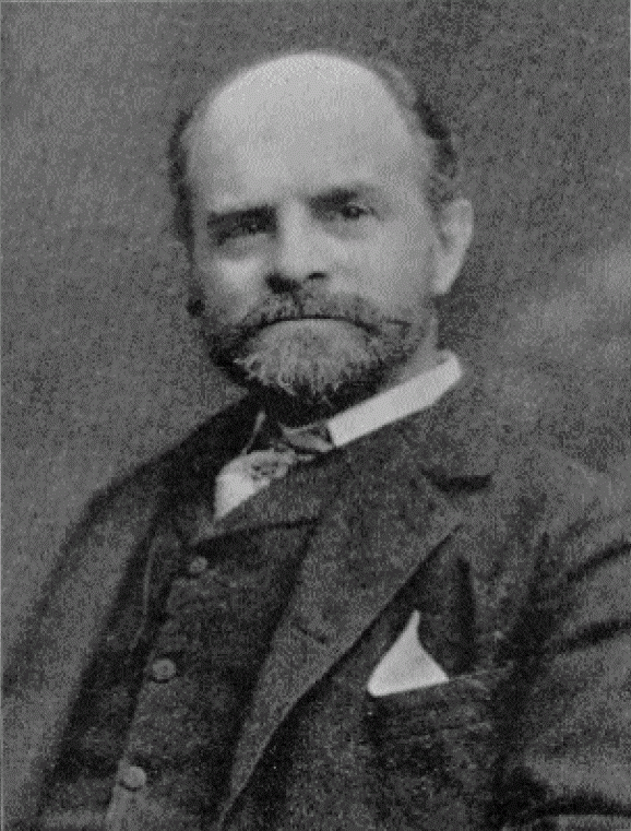 Sir Andrew Thomas Taylor, architecte